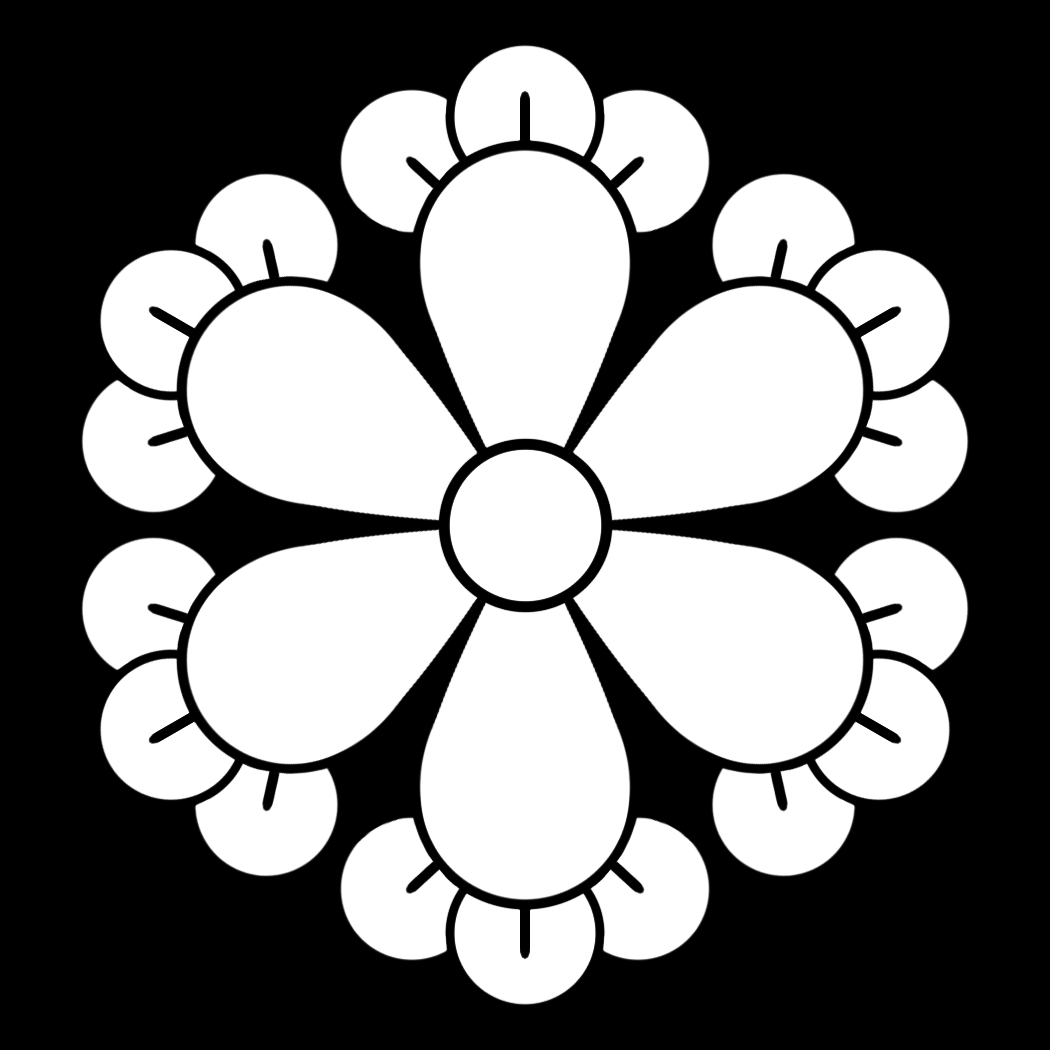 「六つ丁字」紋（染抜）